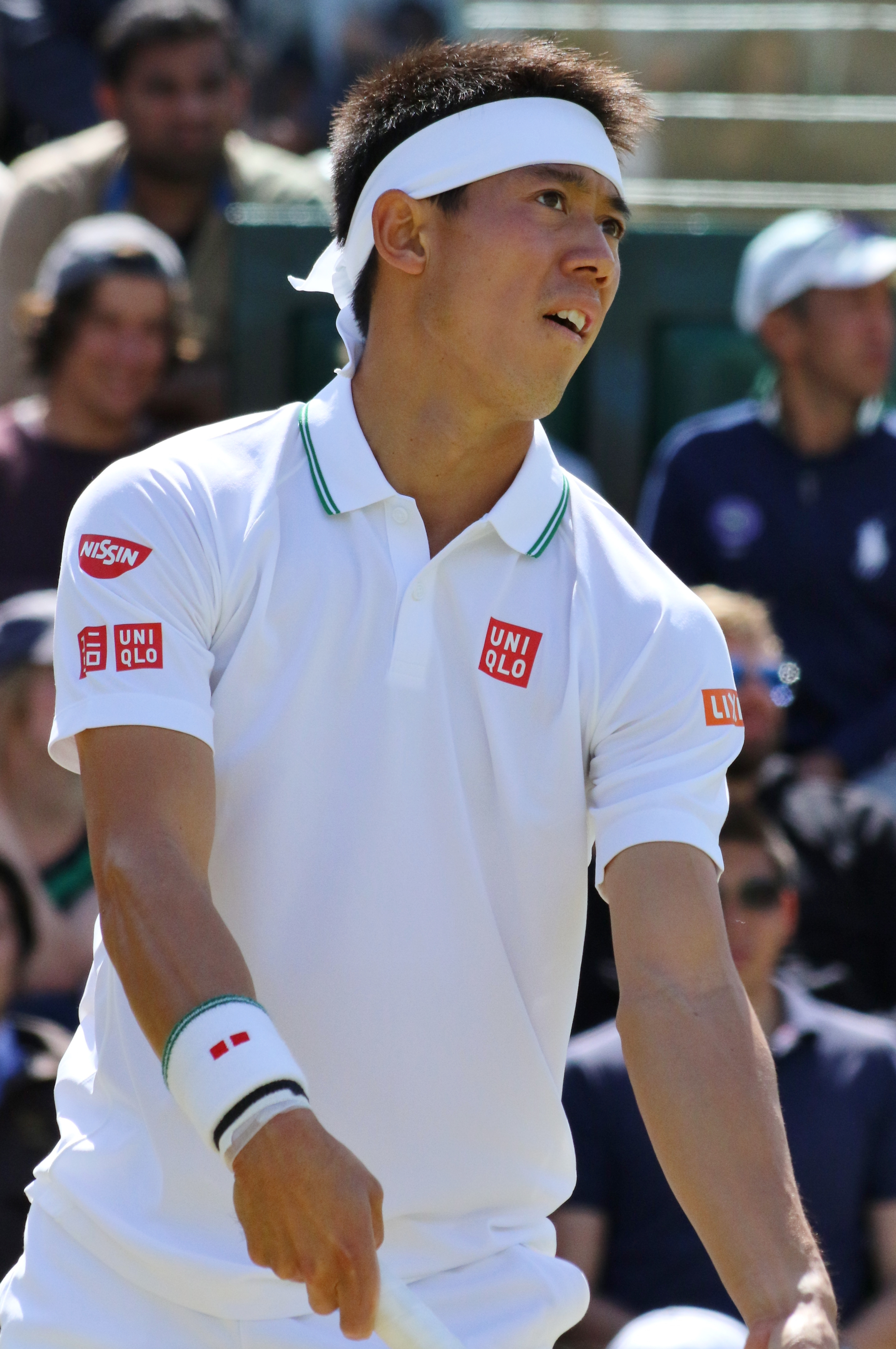 Nishikori WM16 (12)